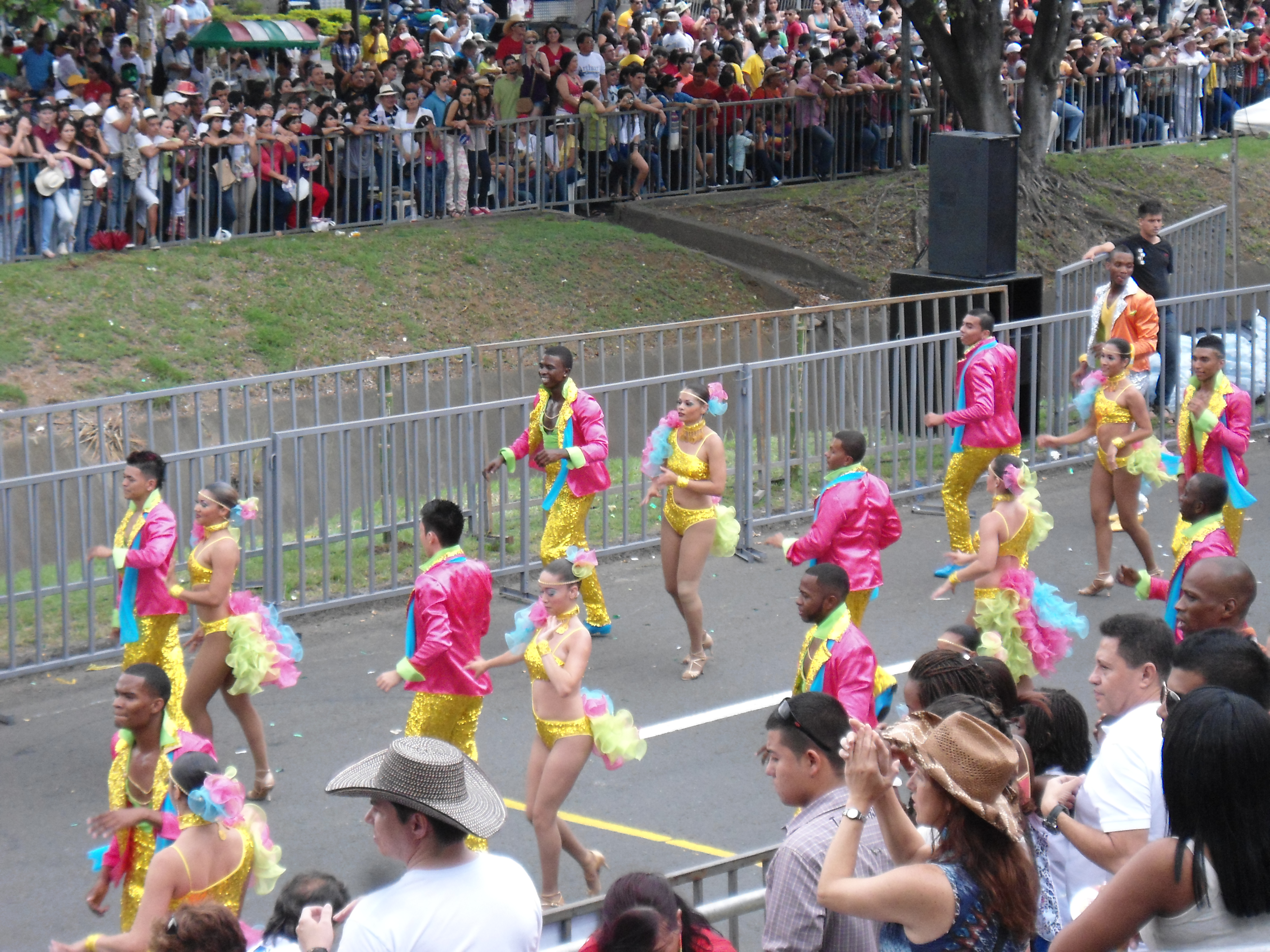 Desfile inaugural de la 56° Feria de Cali en Colombia